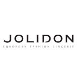 Cluj Napoca